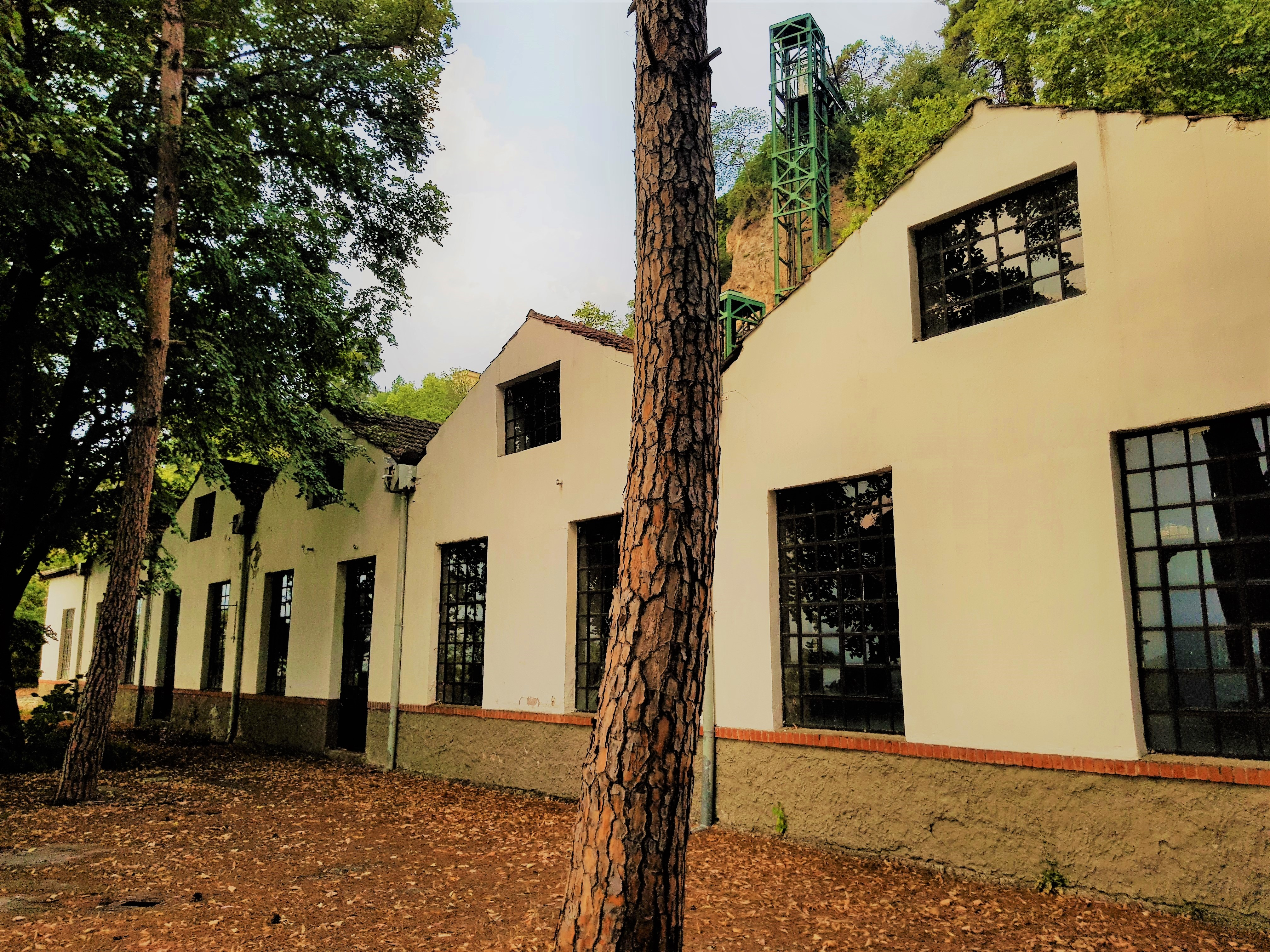 Άποψη του τμήματος παραγωγής του Κανναβουργείου Έδεσσας